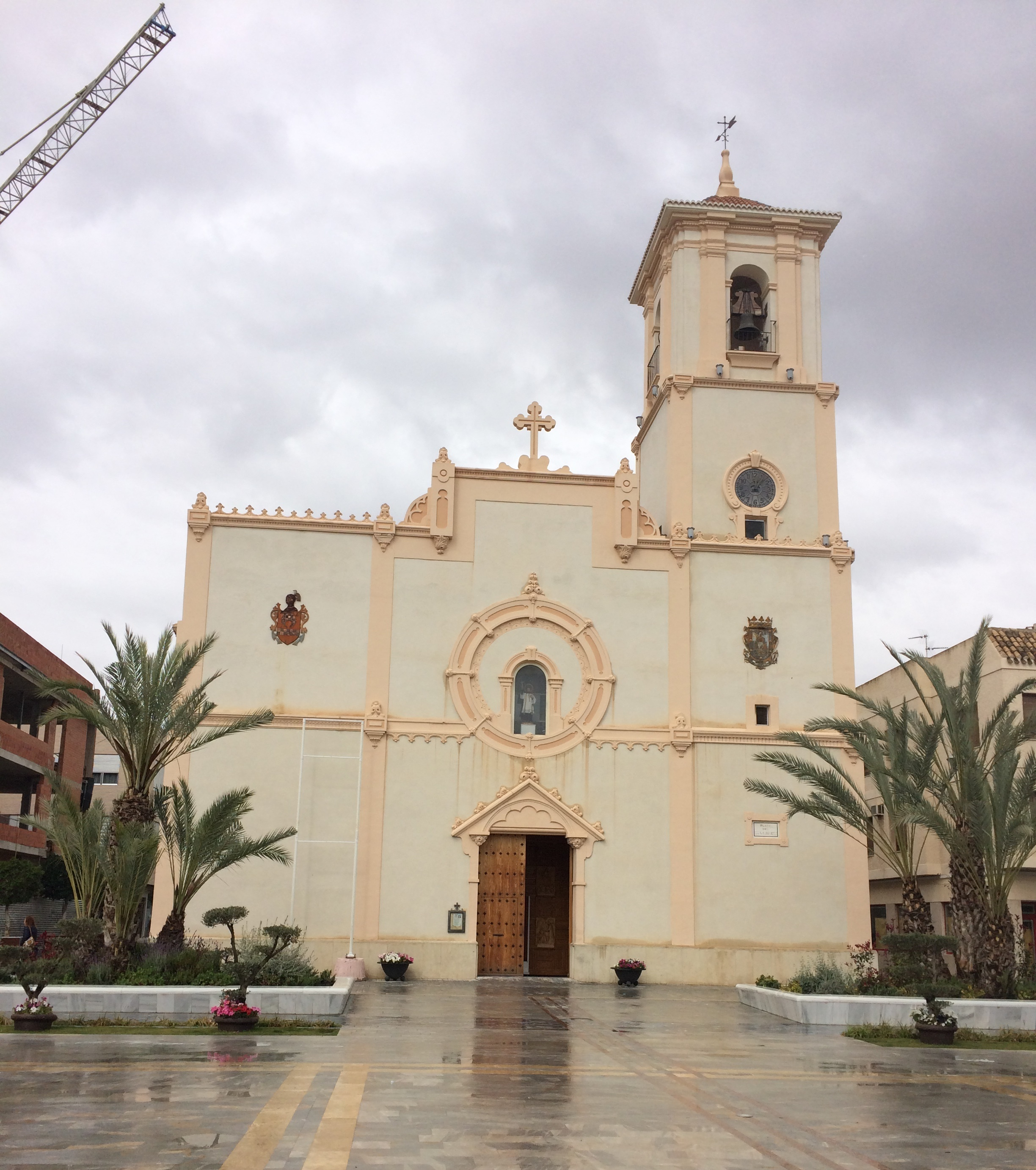 Iglesia de San Javier, Murcia.